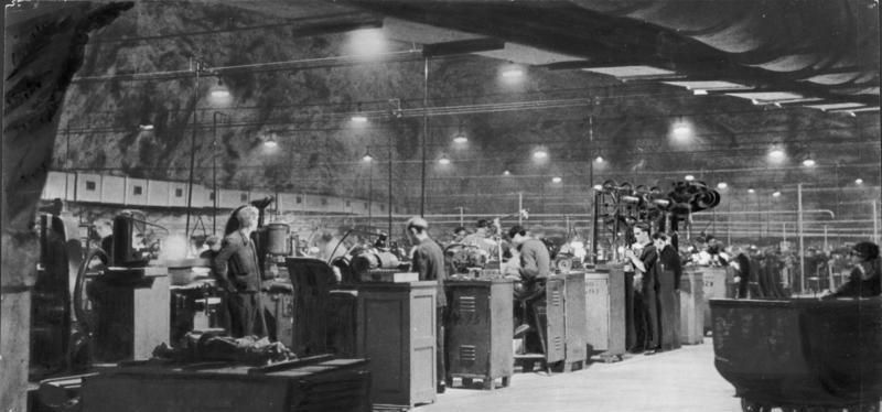 Die Fertigung ist angelaufen. Hunderte von Maschinen haben in einem Saal des unterirdischen Betriebes Platz gefunden. Kein Alarm, keine Bombe kann die Arbeit stören. Die Anweisung des Reichsministers Speer, wichtige Fertigungszweige rechtszeitig unter die Erde zu verlagern, hat wesentlich dazu beigetragen, dass die deutsche Rüstung trotz des Bombenterrors stetig steigende Leistungen vollbringt. Information added by Wikimedia users.Untertage-Verlagerung (Waffenfabrikation)